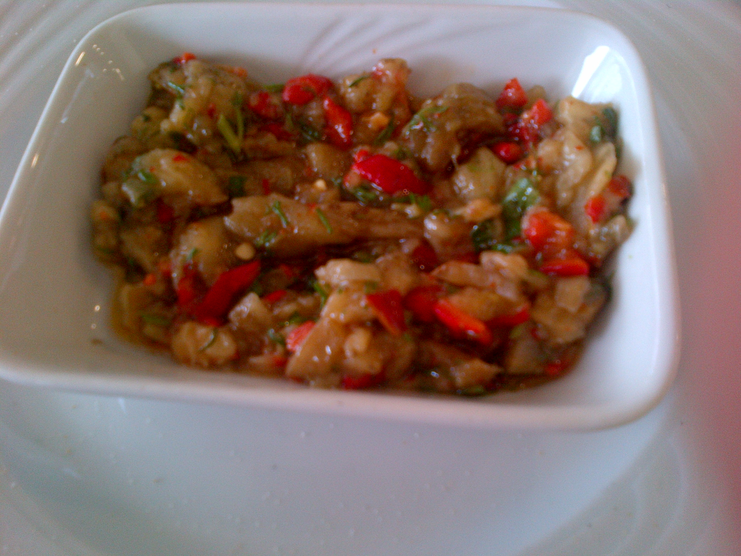 Patlıcan salata o amanida de alberginies de la cuina turca.